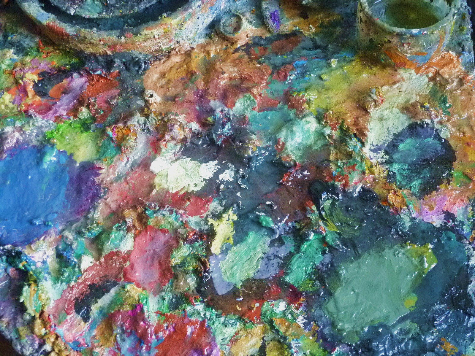 Ramzi GHOTBALDIN, peintre kurde installé à Paris, table de travail